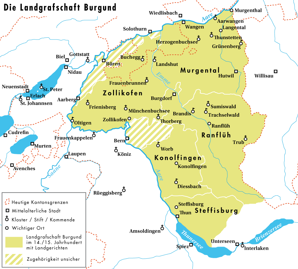 Die Landgrafschaft Burgund im 13./14. Jahrhundert